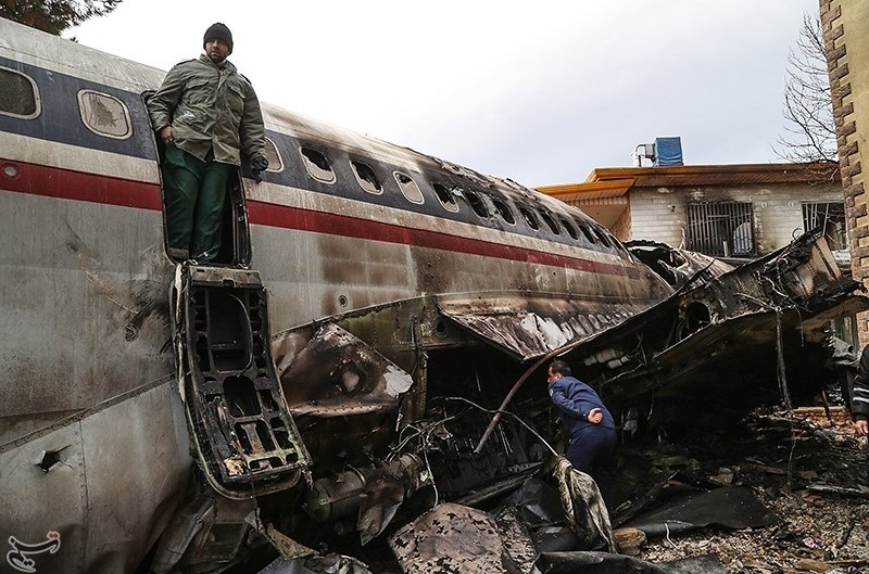 یک فروند هواپیمای باربری بوئینگ ۷۰۷ حامل گوشت از مبدا بیشکک کشور قرقیزستان، اقدام به فرود اضطراری در فرودگاه فتح کرج کرده بود که در هنگام فرود از باند خارج و پس از برخورد با دیوار انتهایی باند و شهرک مسکونی دچار آتش سوزی شد.